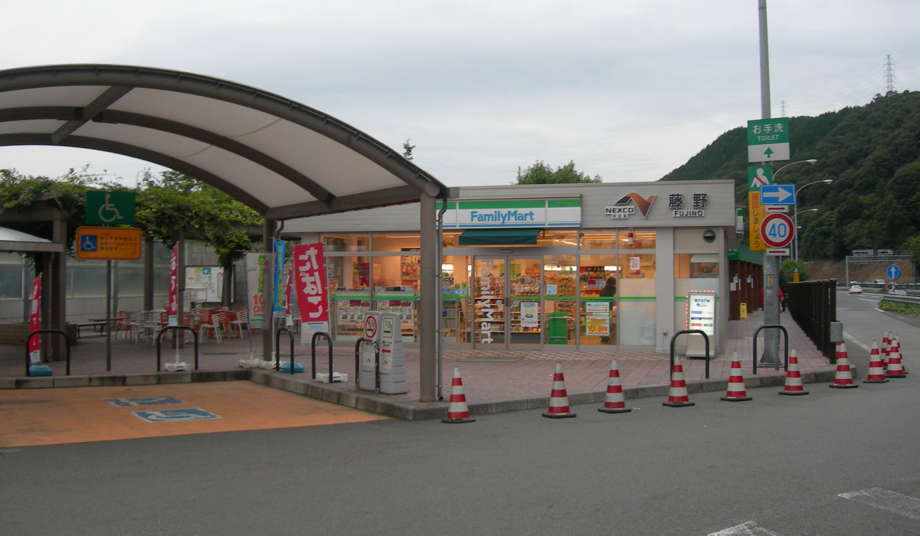 中央自動車道藤野PA下り線